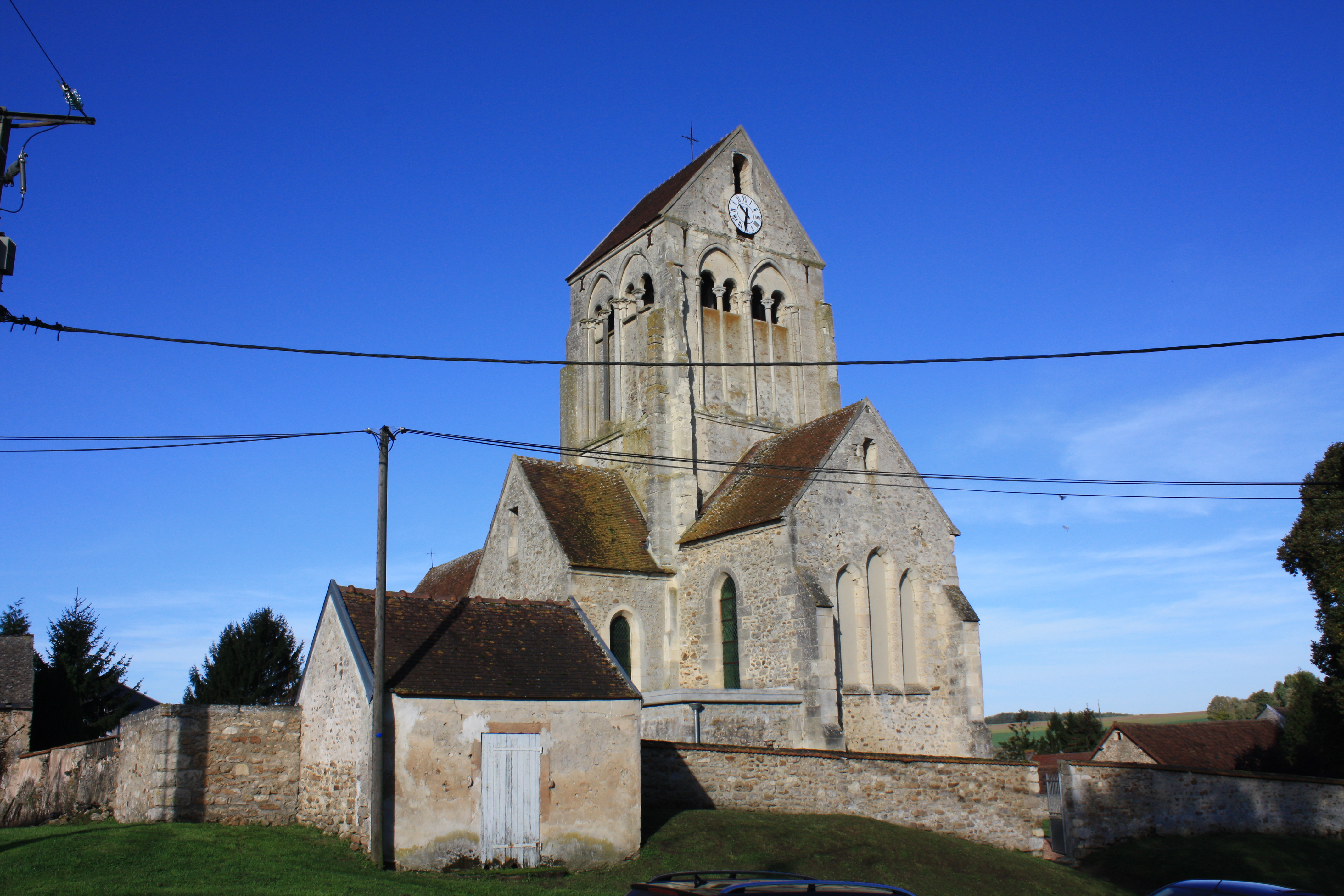 Église Notre-Dame de Cierges